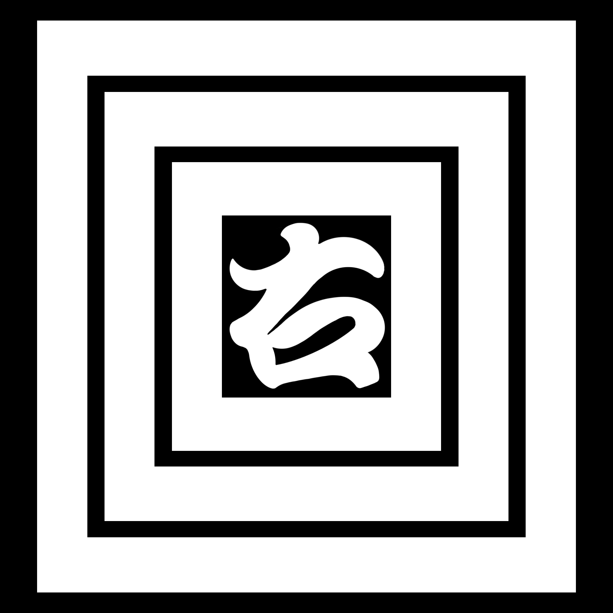 「三升に右」紋（染抜）